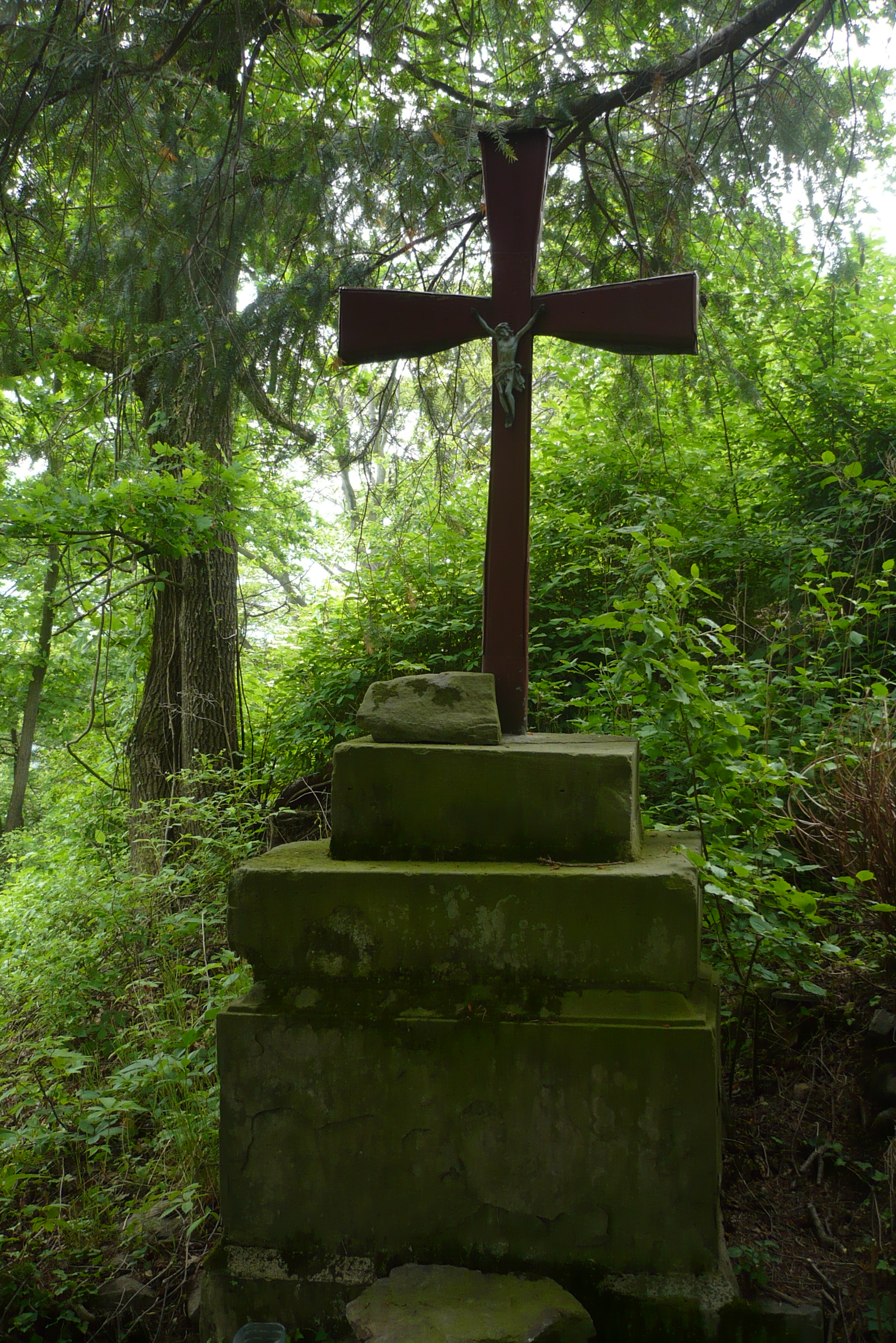 Złoty Stok